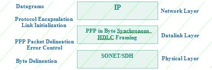 Монгол: Зураг 5-10: OSI загварыг ашигласан SONET / SDH дээрх пакет